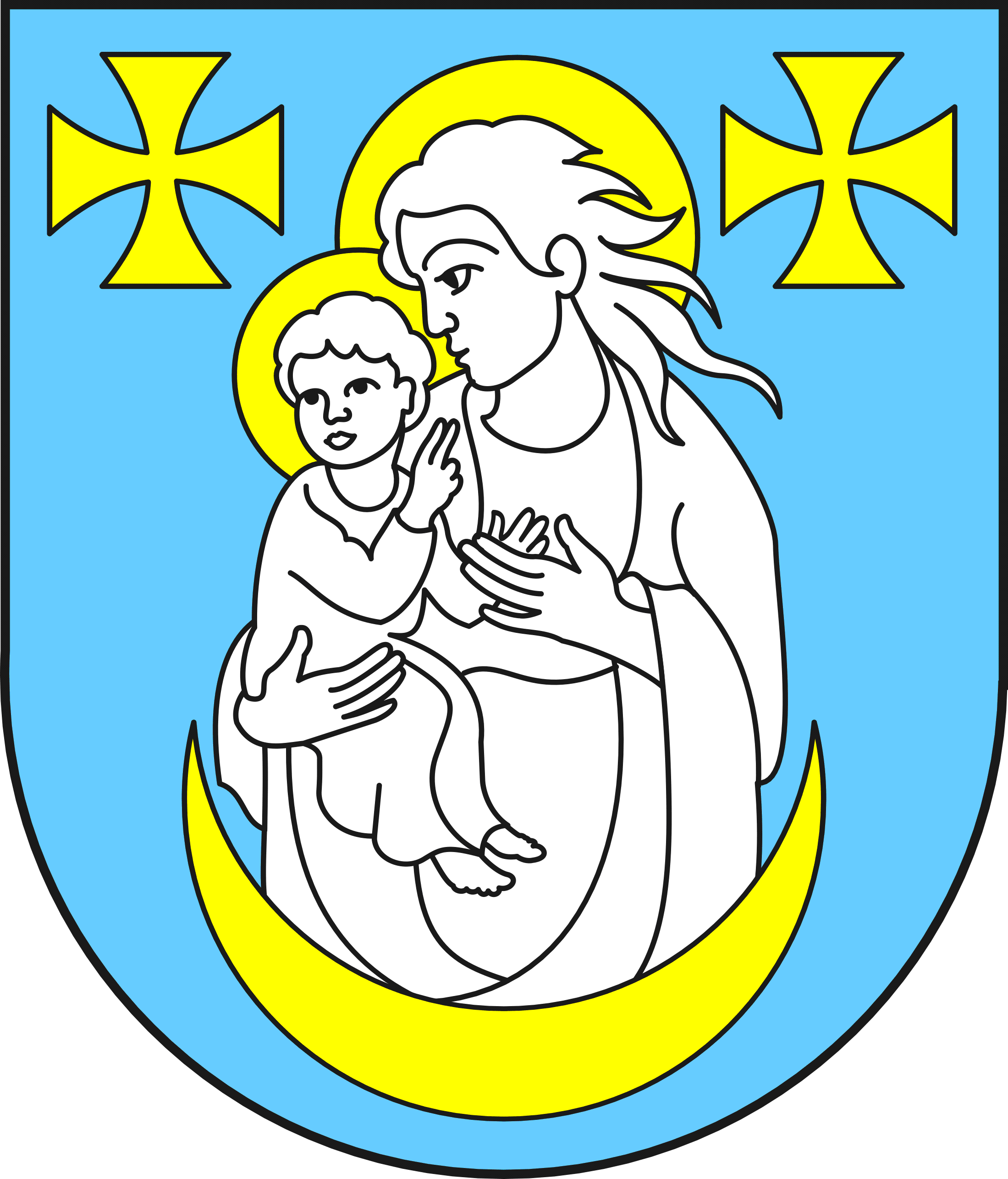 Herb gminy Wysokie Mazowieckie